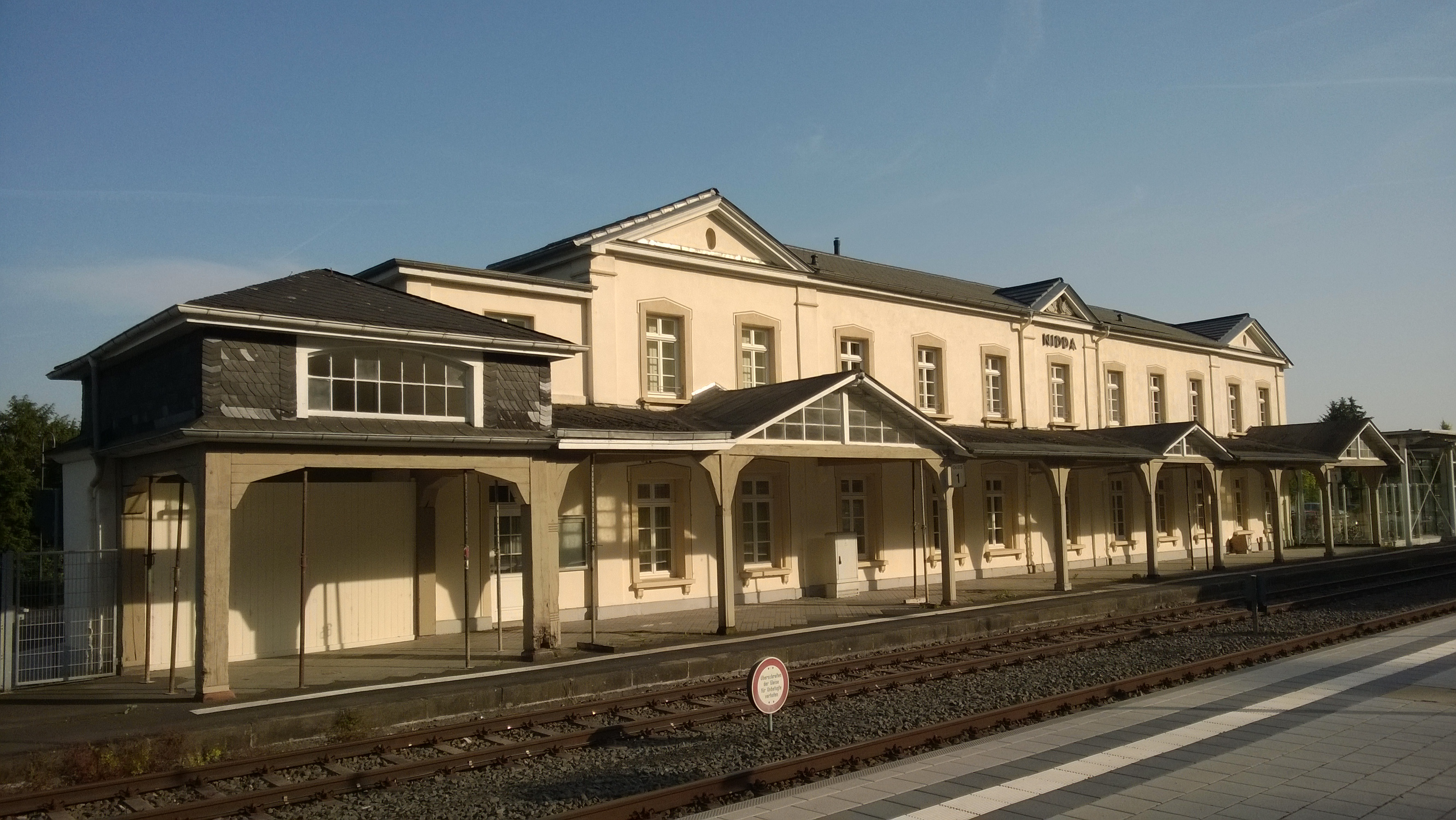 Bahnhofsgebäude des Bahnhofs der Stadt Nidda